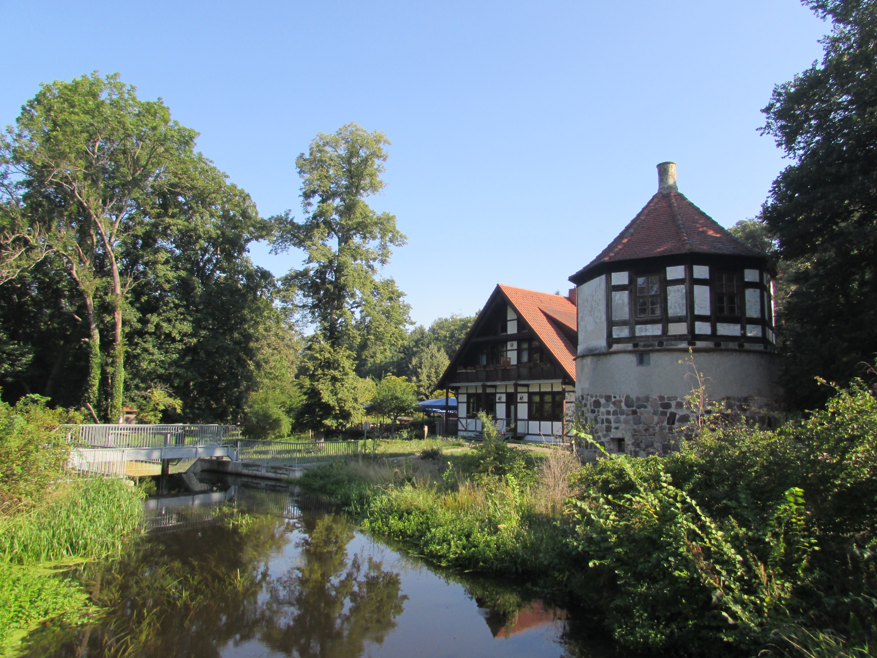 Wohnplatz Neue Mühle an einem alten Mühlenstau im Verlauf der Buckau. Rechts der historische Wehrturm der Landwehr der Stadt Neustadt Brandenburg, dahinter die Gaststätte Neue Mühle.